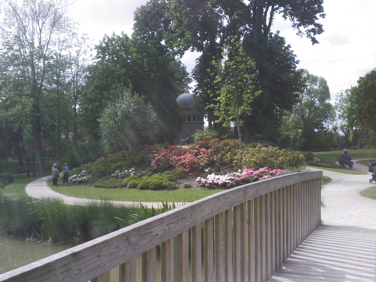 Parc de Ladoucette à Drancy